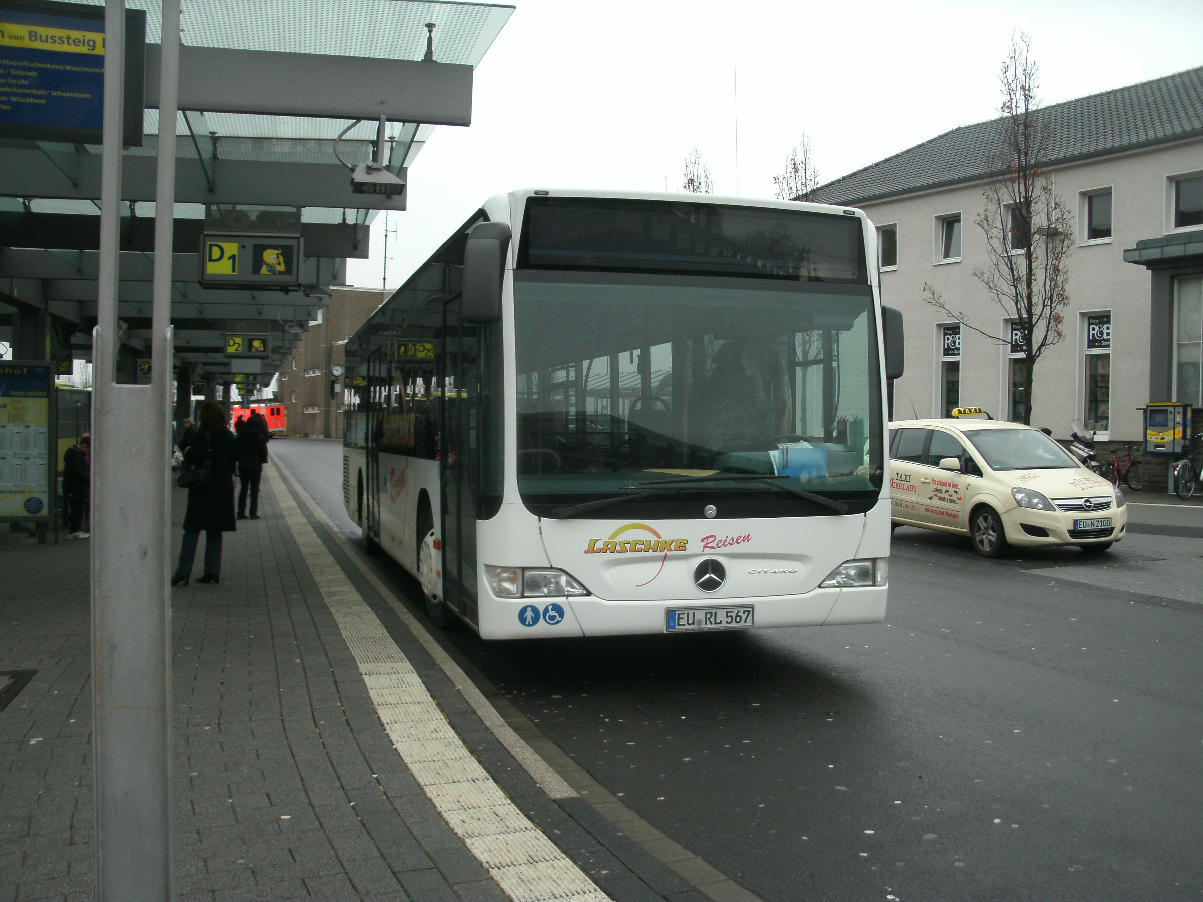 Linienbus der Firma Laschke-Reisen im Auftragsverkehr der SVE (Stadtverkehr Euskirchen) am Busbahnhof vor dem Euskirchener Bahnhof